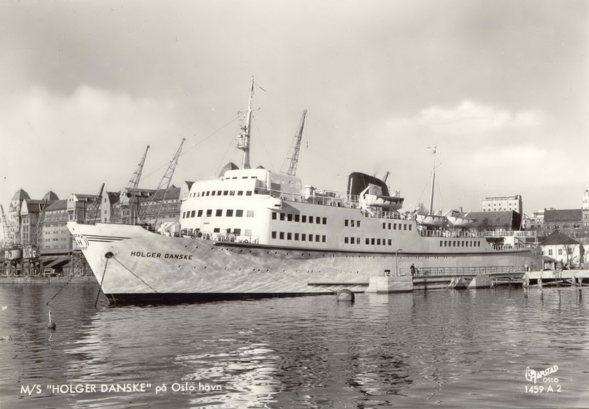 "Danskebåten" Holger Danske, bygd 1961 av Hanseatische Werft GmbH, Hamburg, Tyskland.